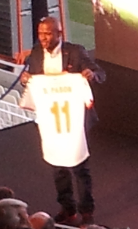 Dorlan Pabón a la seua presentació en Mestalla